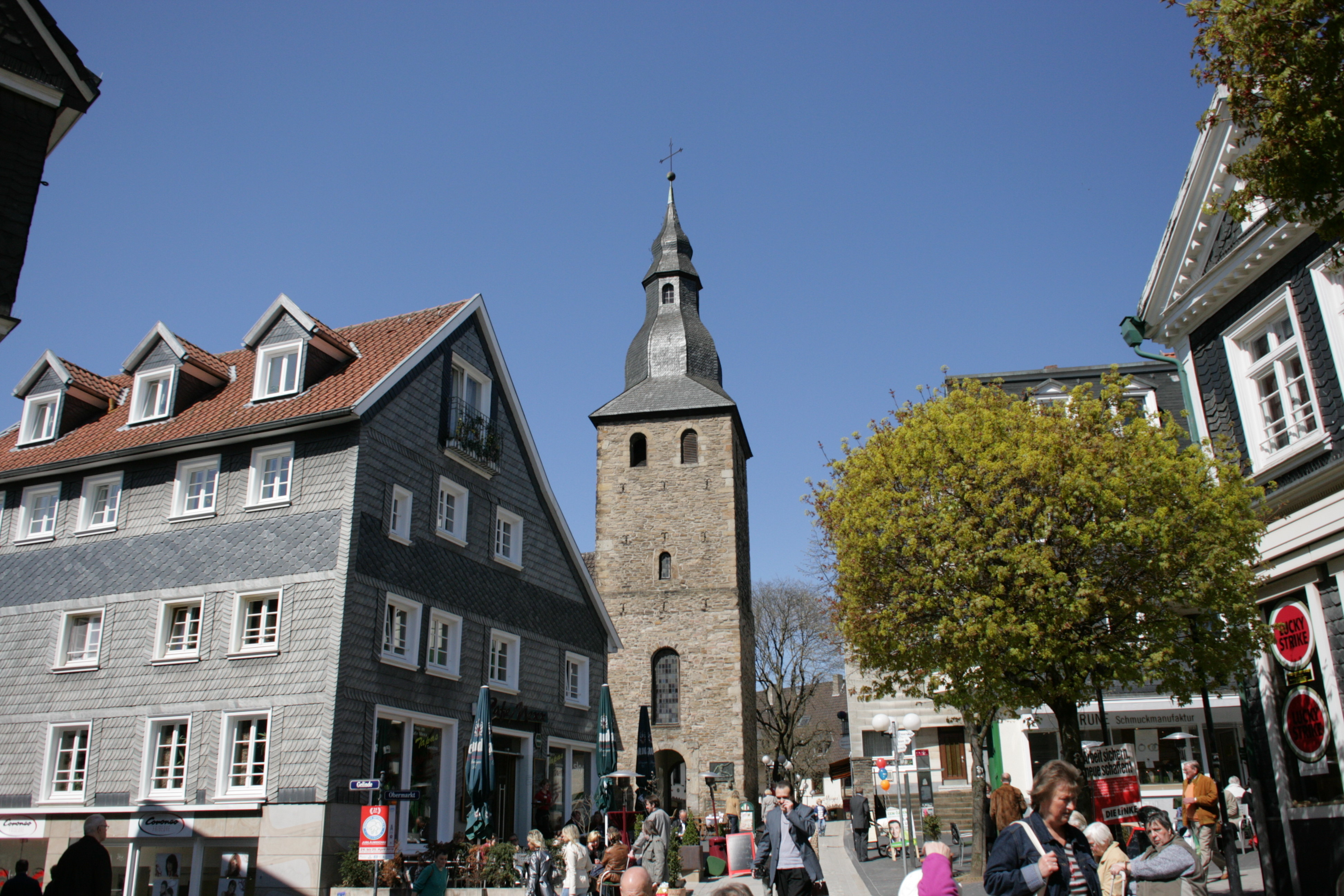 Blick vom Untermarkt zum Glockenturm in Hattingen, links Haus Obermarkt 1